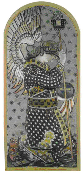 Ангел. Панно. 1892 Вышивка Е.А. ПРАХОВОЙ по эскизу В.М. ВАСНЕЦОВА Архангел облачён в красно-коричневый плащ, обшитый золотой орнаментированной каймой и скреплённый на груди фибулой. Пышные волосы, падающие на плечи, сцеплены перевязью и диадемой. Крылья вместо перьев обрисованы каплевидными, перетекающими одна в другую формами. Расцвечивающие их размывы красок создают впечатление радужных переливов. Крупные узоры на одежде Архангела также «вылеплены» красочной массой. Они другого, более условного характера, связанного с рукотворными ценностями, и напоминают некую упрощённую вариацию на тему кувшина или вазы, обычно украшающих пилястры и колонны в картинах ренессансных художников. Можно усмотреть в них и некоторое сходство с кувшинчиками на филигранях ранних инкунабул. А кувшинчик – это один из символических предметов, ассоциирующихся с Девой Марией и Младенцем1.